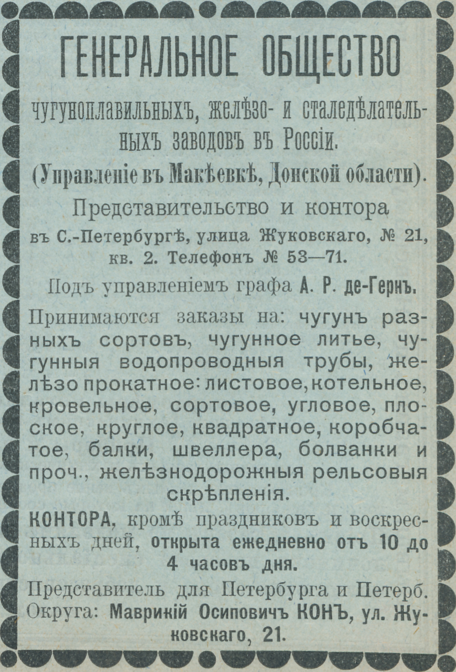 Реклама Генерального общества, 1907 год.